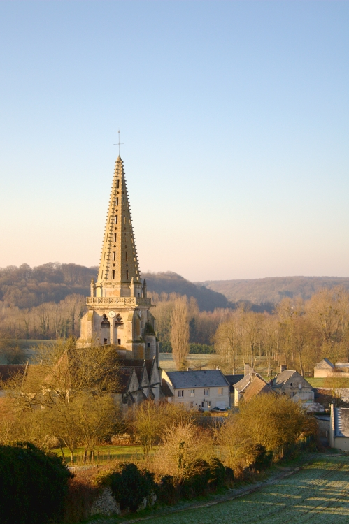 eglise de Hautefontaine oise